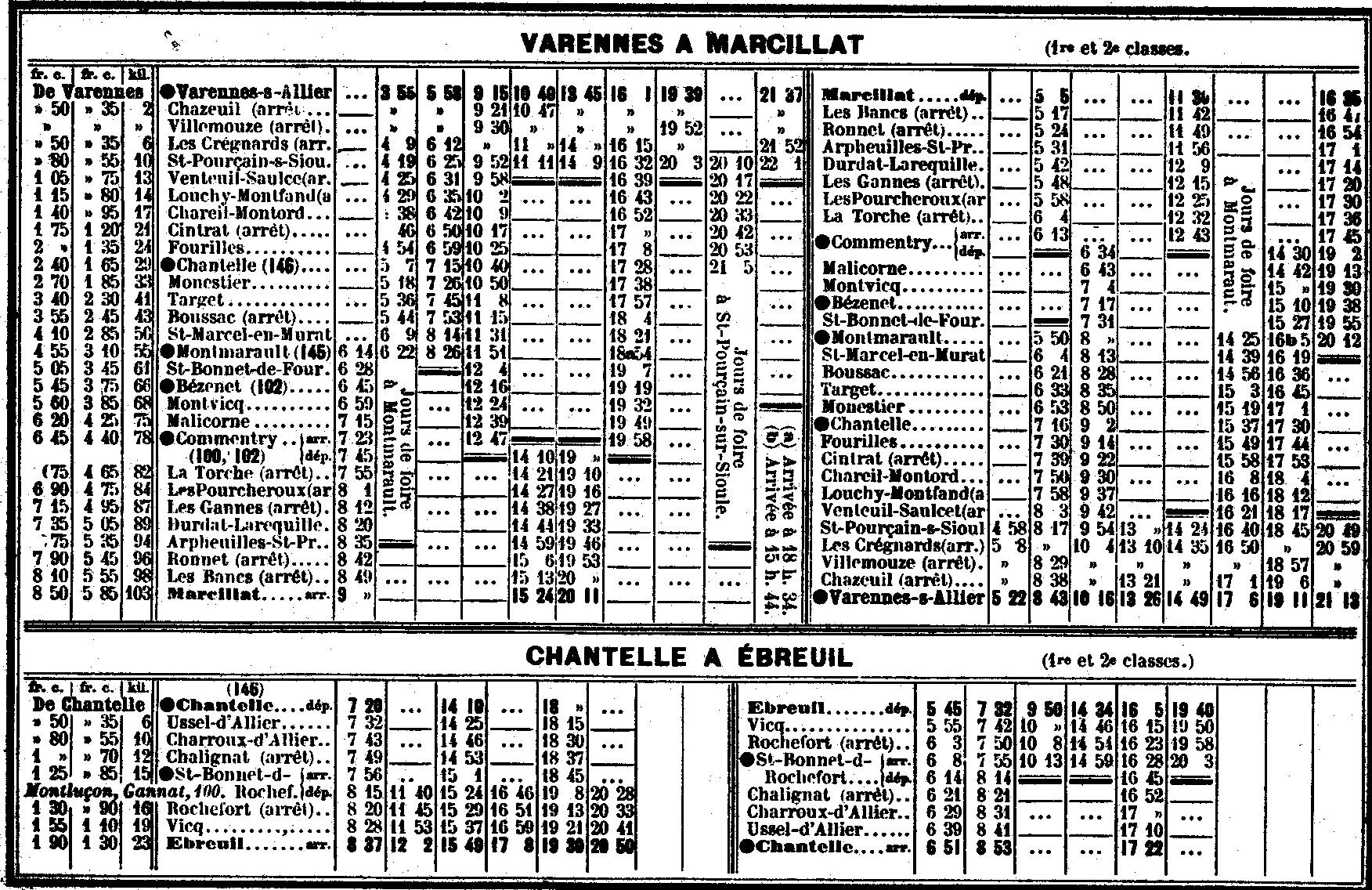 Extrait du Livret Chaix de Mai 1914 (2ème partie : PO (compagnies diverses), page 146 : lignes Varennes à Marcillat et Chantelle à Ebreuil